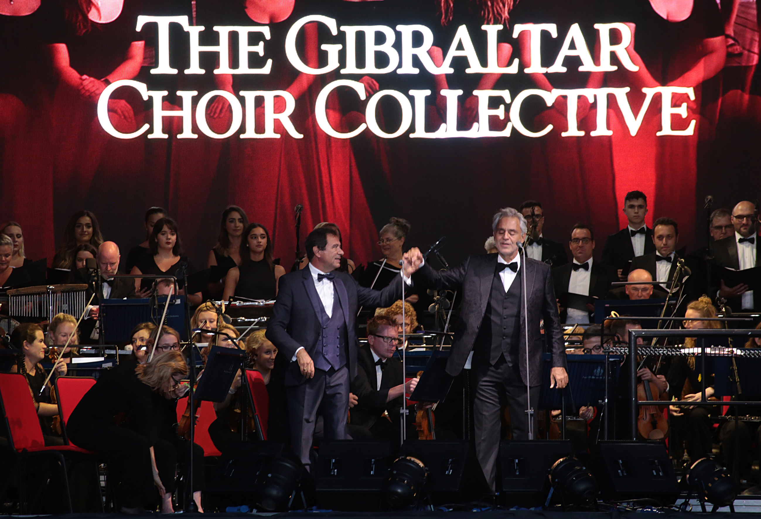 Al comienzo del concierto, Bocelli y el director de la Royal Philharmonic Concert Orchestra, Marcello Rota, se saludaron frente a un entregado público. Sobre la pantalla se ve la presentación del Gibraltar Choir Collective, que acompañó al tenor en su actuación.